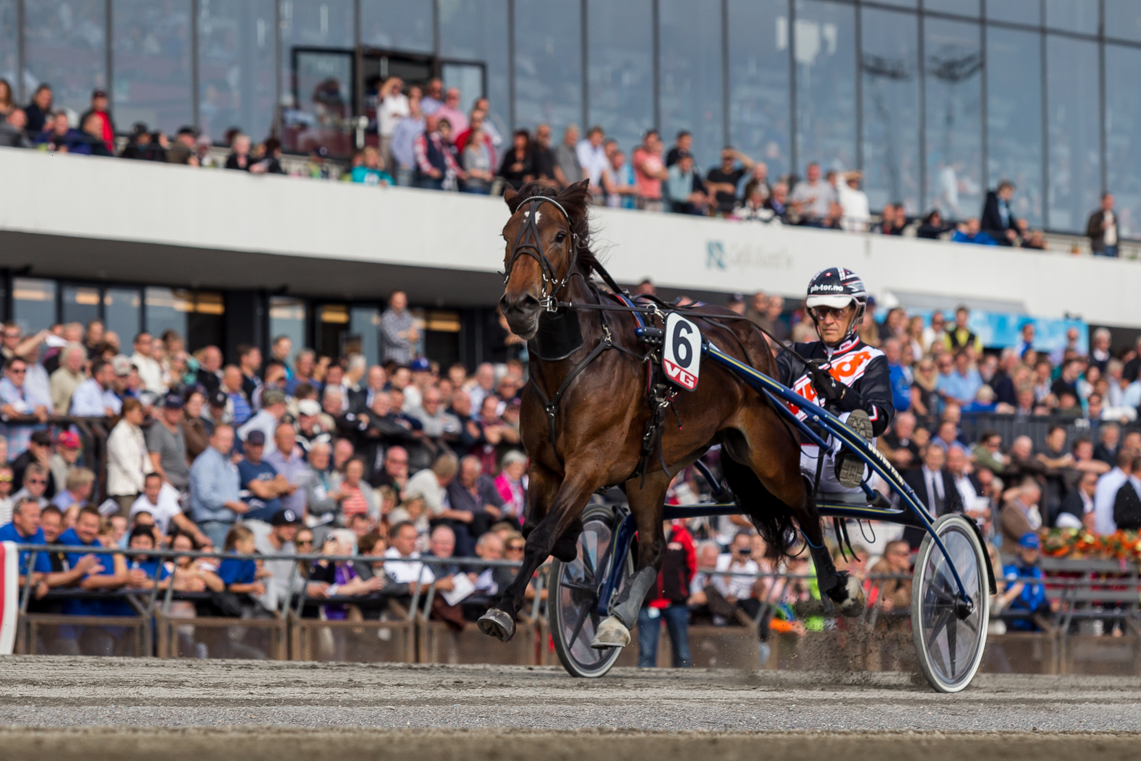 Lannem Silje og Tor Wollebæk vant VG Norsk Travderby 2014